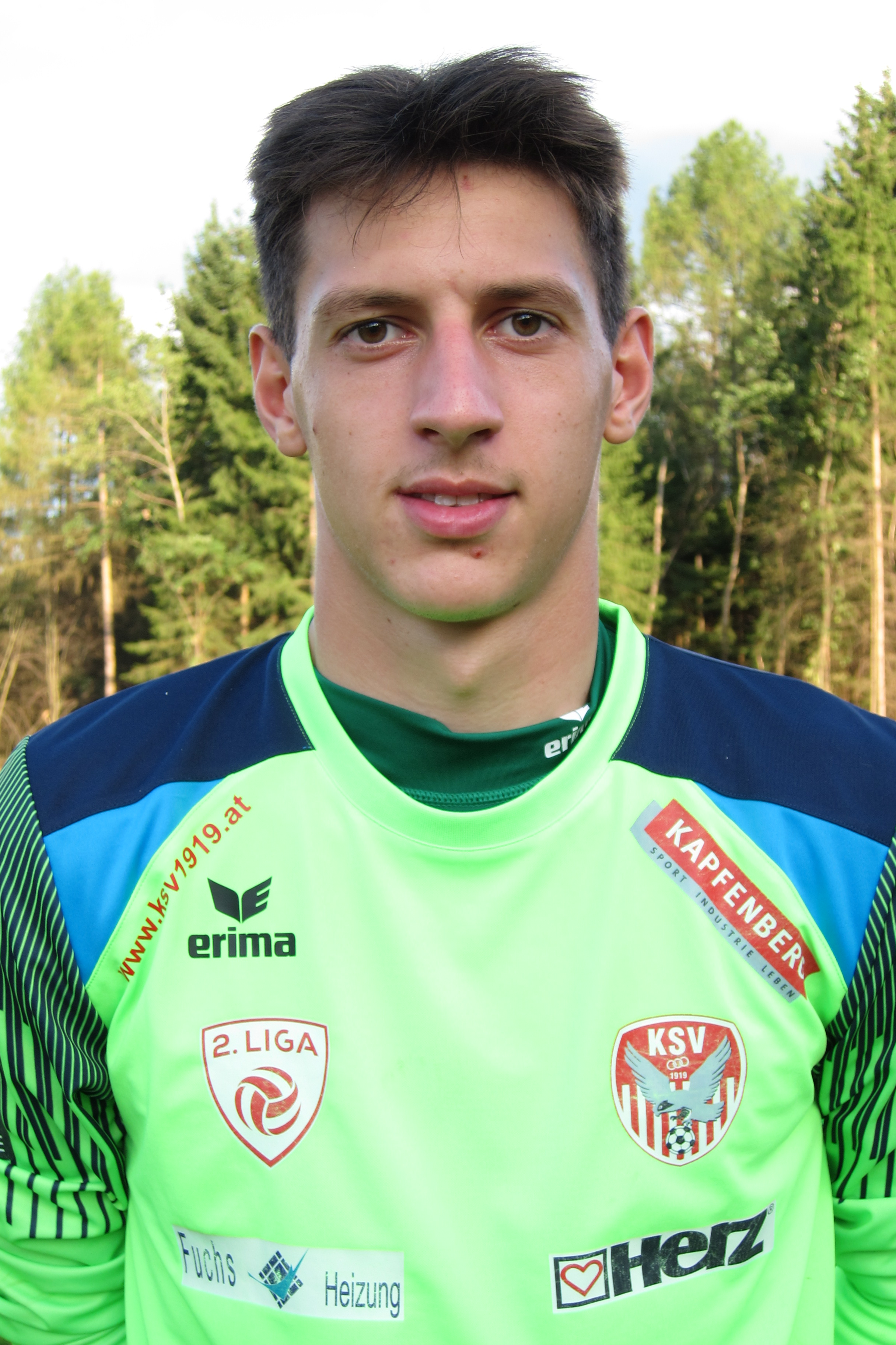 Fabian Ehmann (KSV)